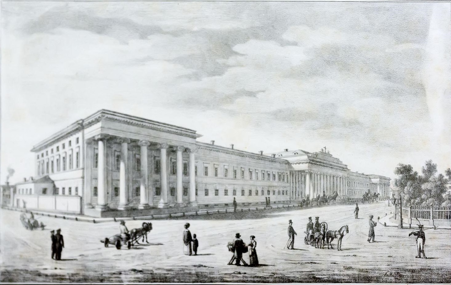 Турин В. С. Императорский Казанский университет. Лист из альбома: «Перспективные виды губернского города Казани…». — М.: Литография Ястребилова. — 1834. Бумага, литография.